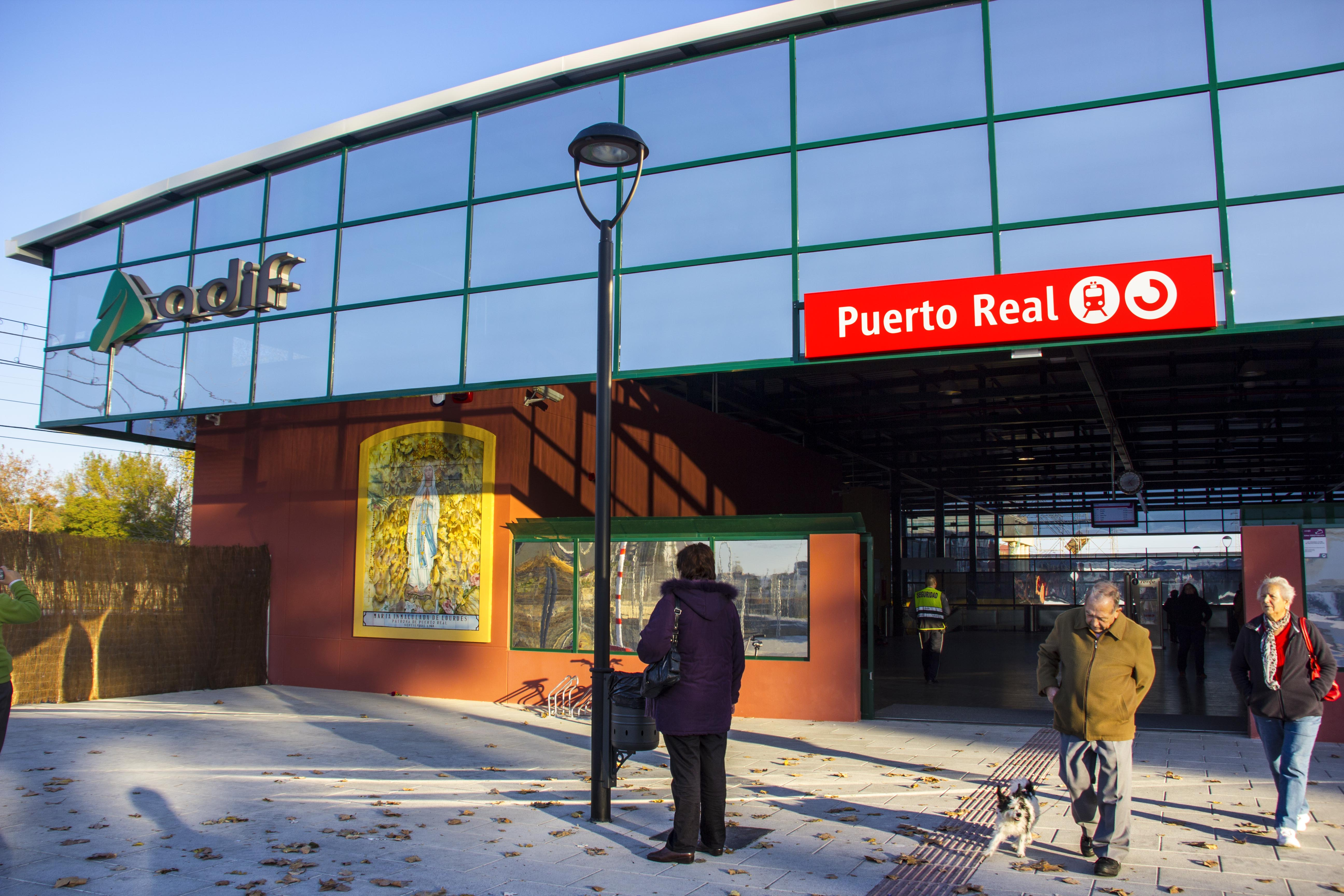 Nueva Estación de tren de Puerto Real, en España